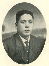 Bân-lâm-gú: 陳朝駿 Tân Tiâu-chūn